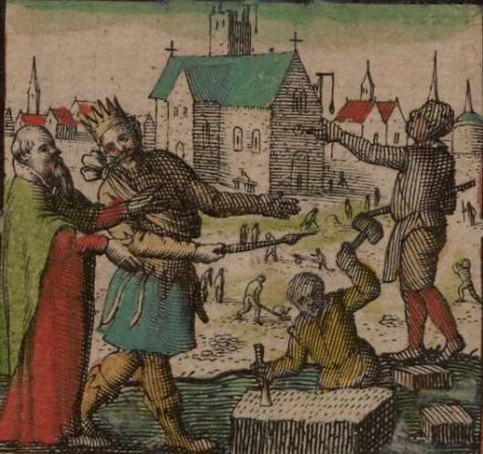 Sæberht of Essex